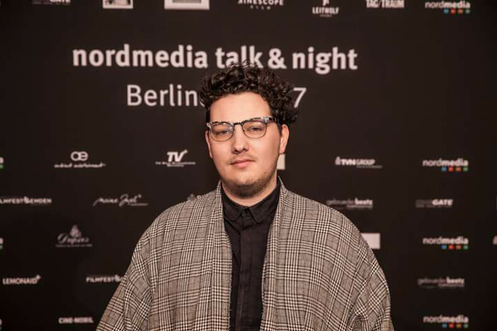 Mario Canedo, Schauspieler auf der Berlinale 2017, Nordmediaempfang